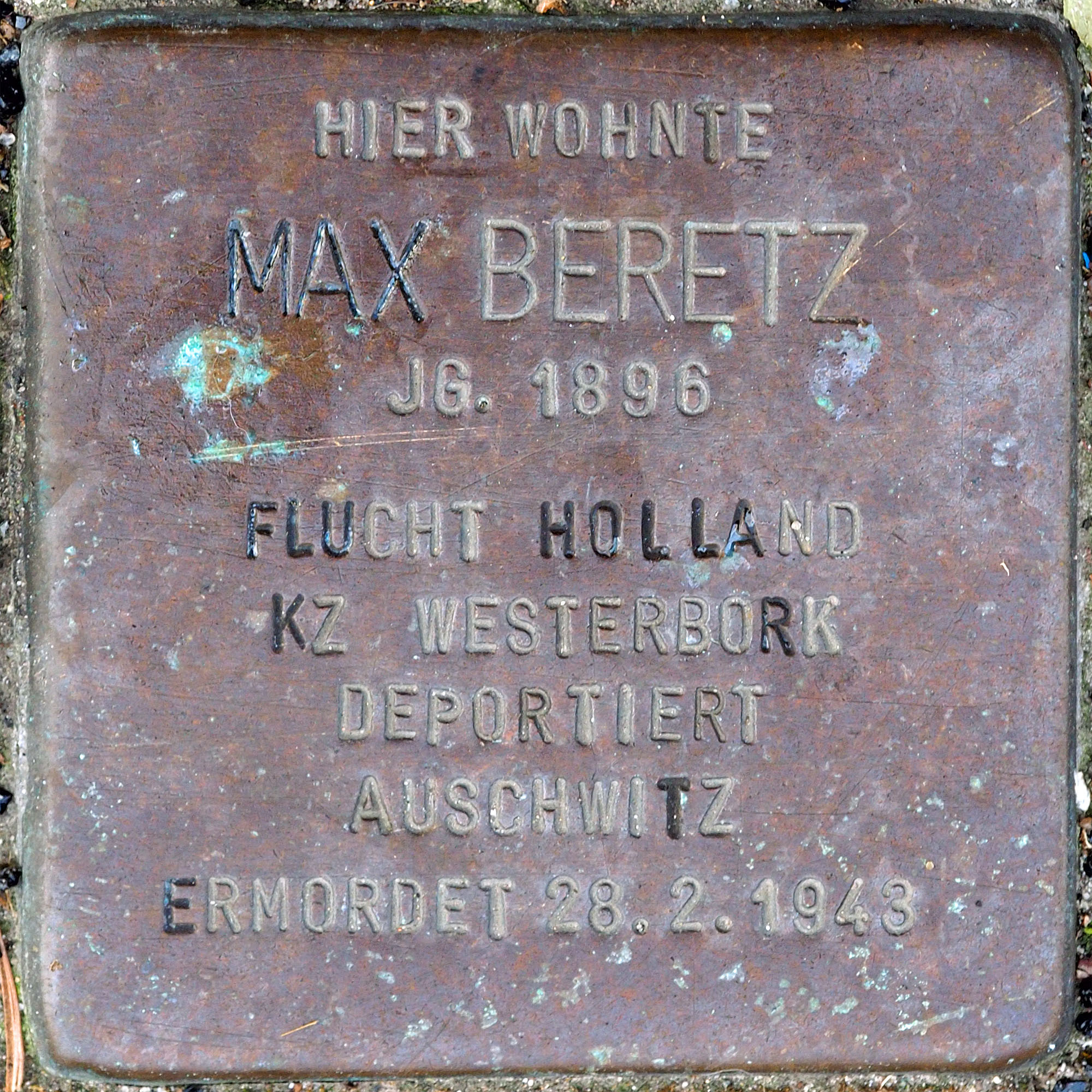 Stolpersteine MG: Berentz, Max